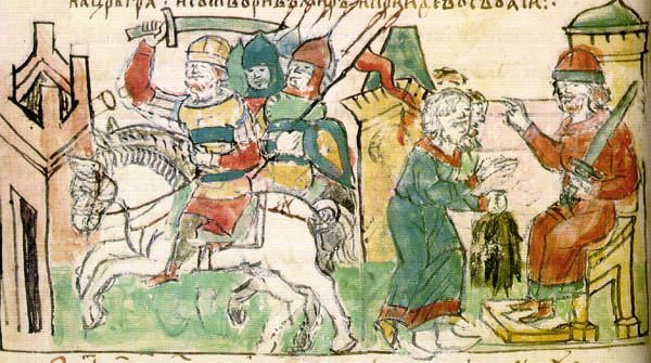 Radzivill chronicle. Knyaz Igor takes tribute from drevlyan. Древляне приносят дань Игорю. Стр. 20 обр.